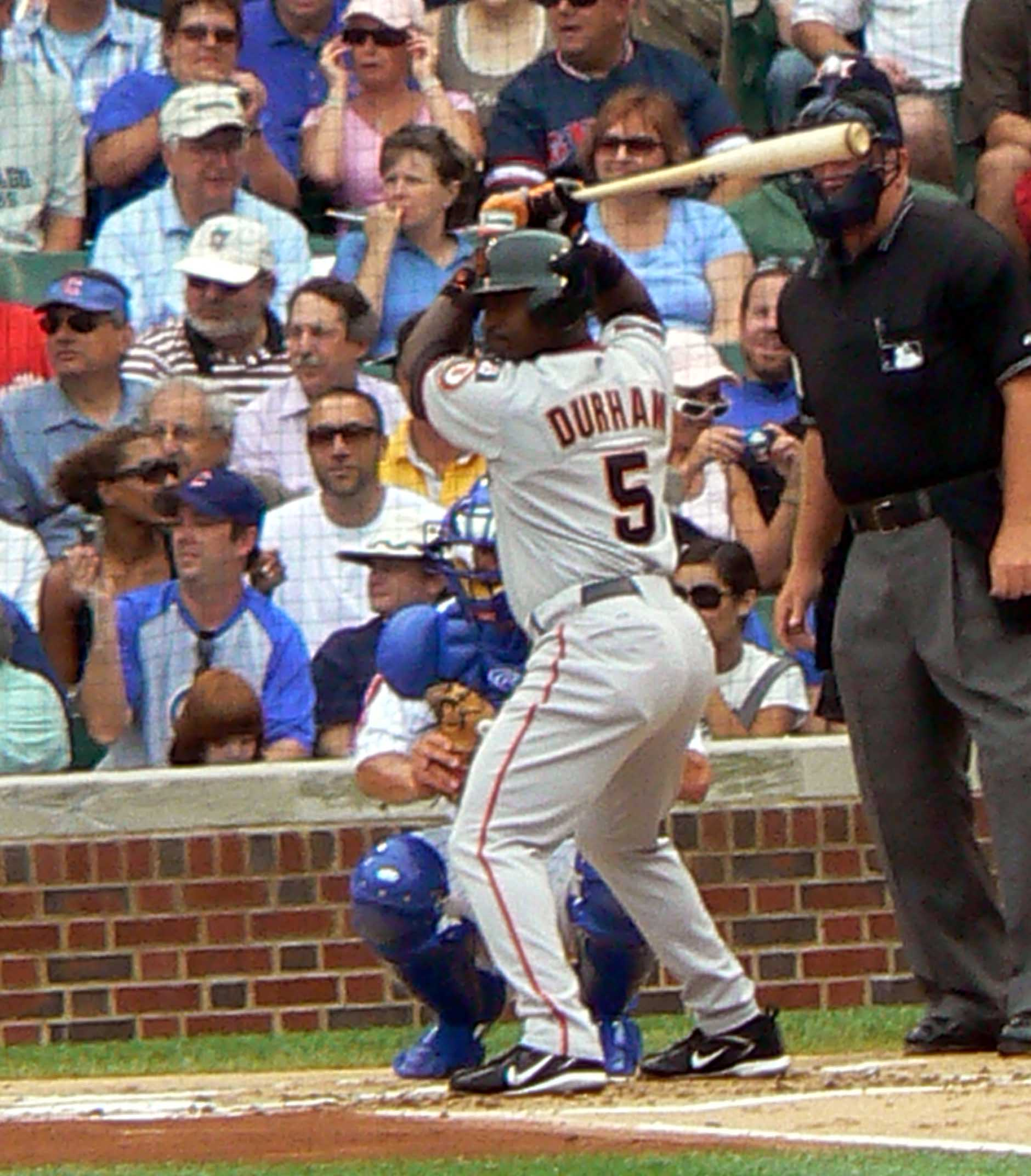 Ray Durham at bat